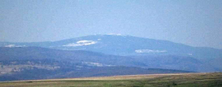 Csicsói-Hargita (1755 m)